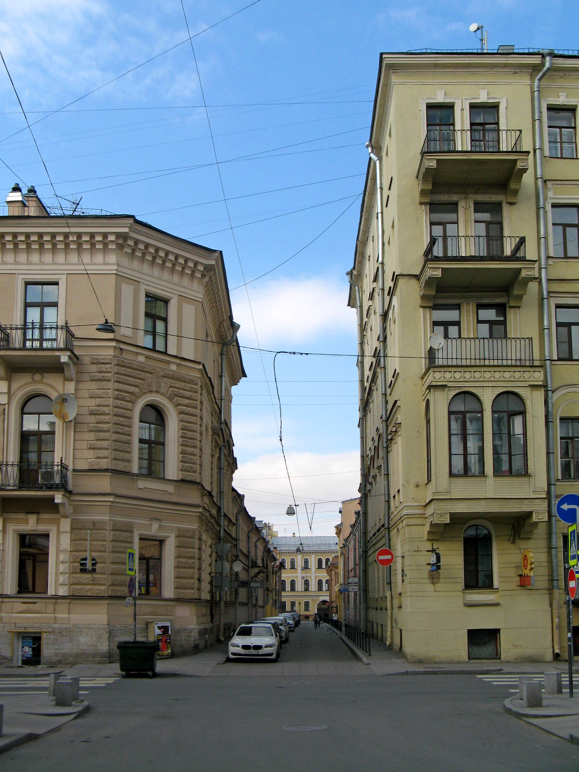 Друскеникский переулок, Санкт-Петербург